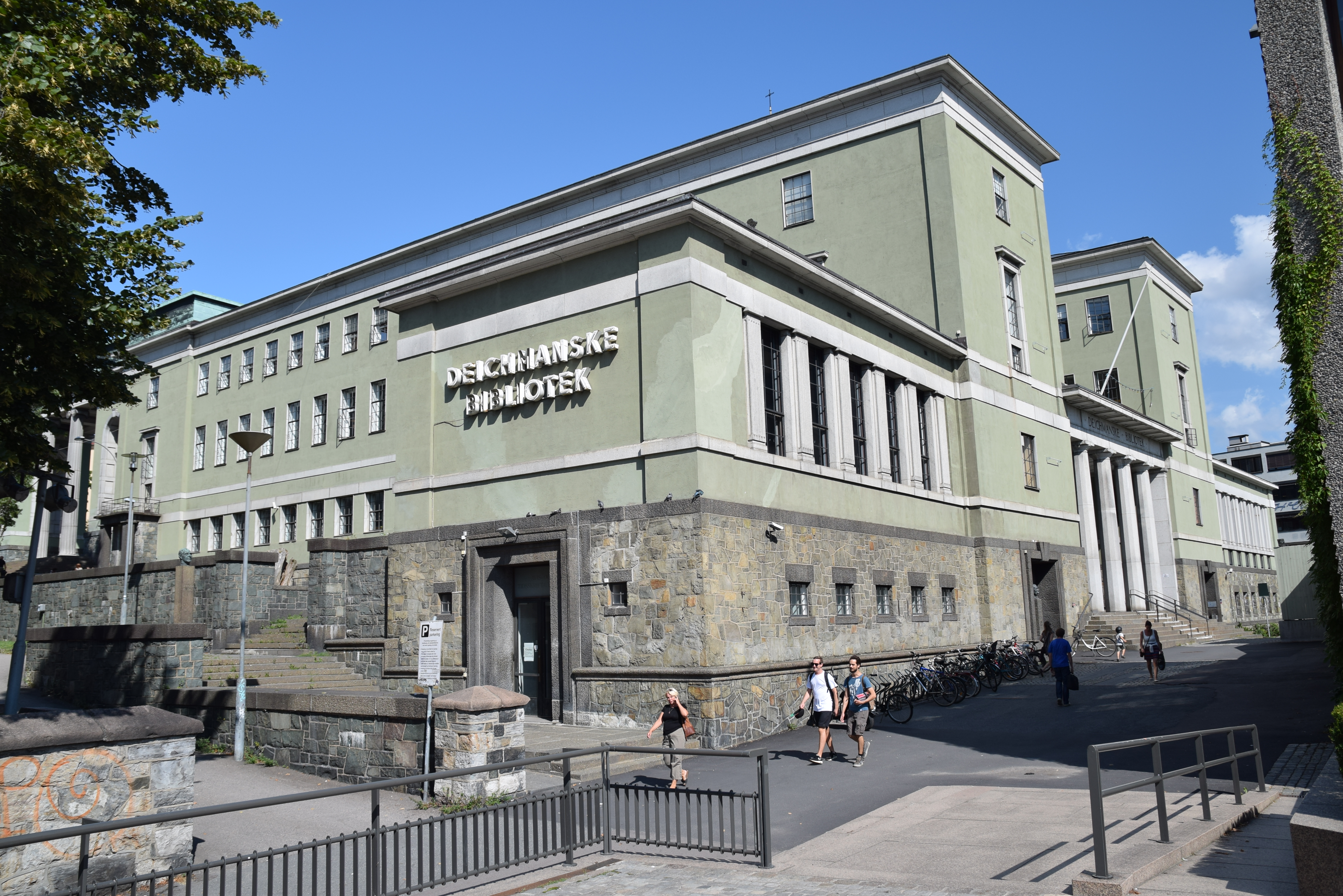 Deichmanske bibliotek, Arne Garborgs plass 4, Oslo, sett fra sydvest